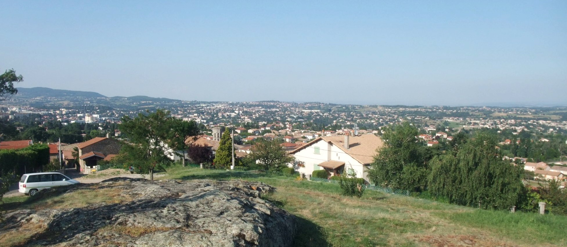 Roiffieux vue de la Garde